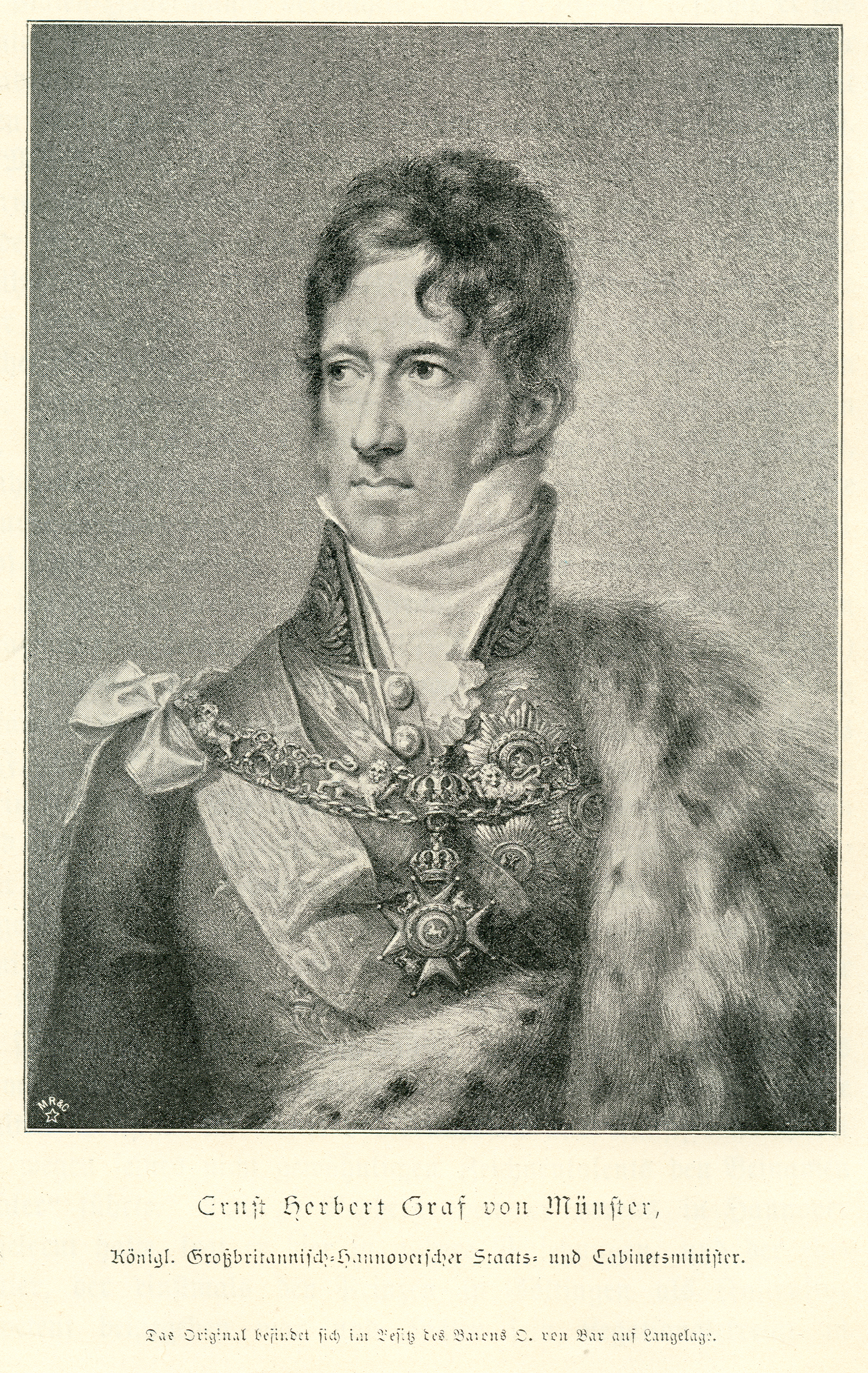 „Ernst Herbert Graf von Münster, Königlich-Großbritannisch-Hannoverscher Staats- und Kabinettsminister.“ Die weitere Untertitelung lautet: „Das Original befindet sich im Besitz des Barons O. von Bar auf Langelage.“ Reproduktion von M R & C (siehe die Signatur unten links mit Stern) nach einem Ölgemälde von Eduard Ströhling (auch: E. Ströling oder Peter Edward Stroehling) von 1822, abgebildet in dem Buch von William von Hassell: Geschichte des Königreichs Hannover. Unter Benutzung bisher unbekannter Aktenstücke, Bd. 1 ( = Erster Teil. Von 1813 bis 1848), Leipzig: Verlag und Druck von M. Heinsius Nachfolger, 1898 ...